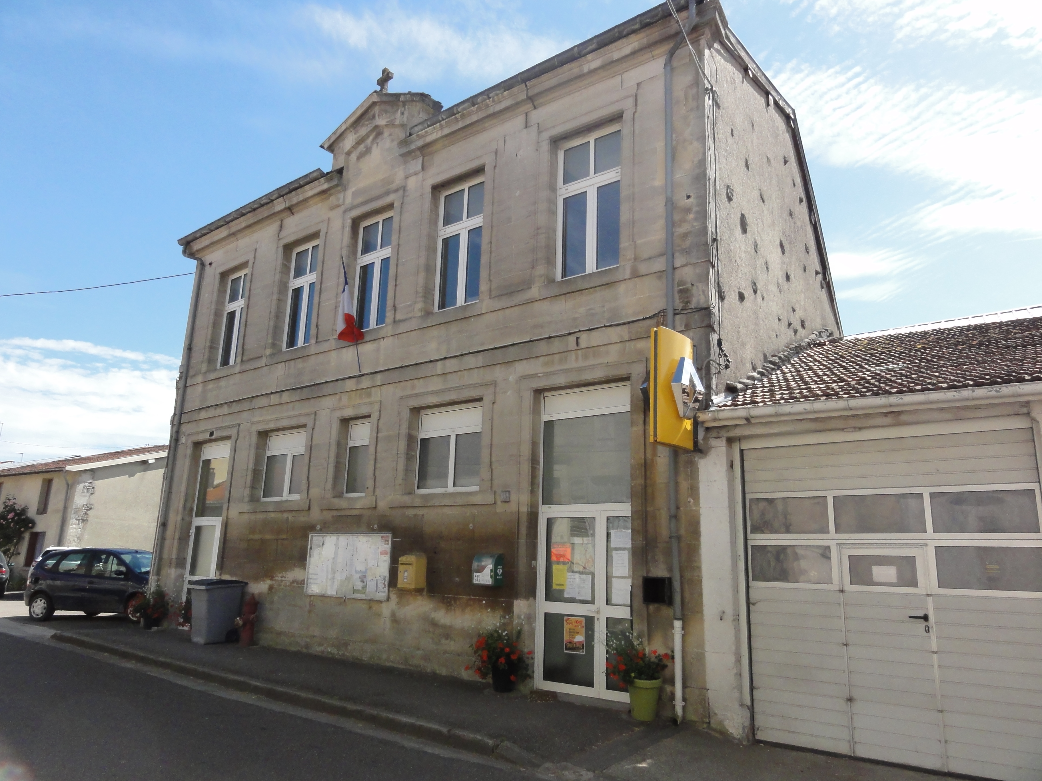 Ménil-sur-Saulx (Meuse) mairie